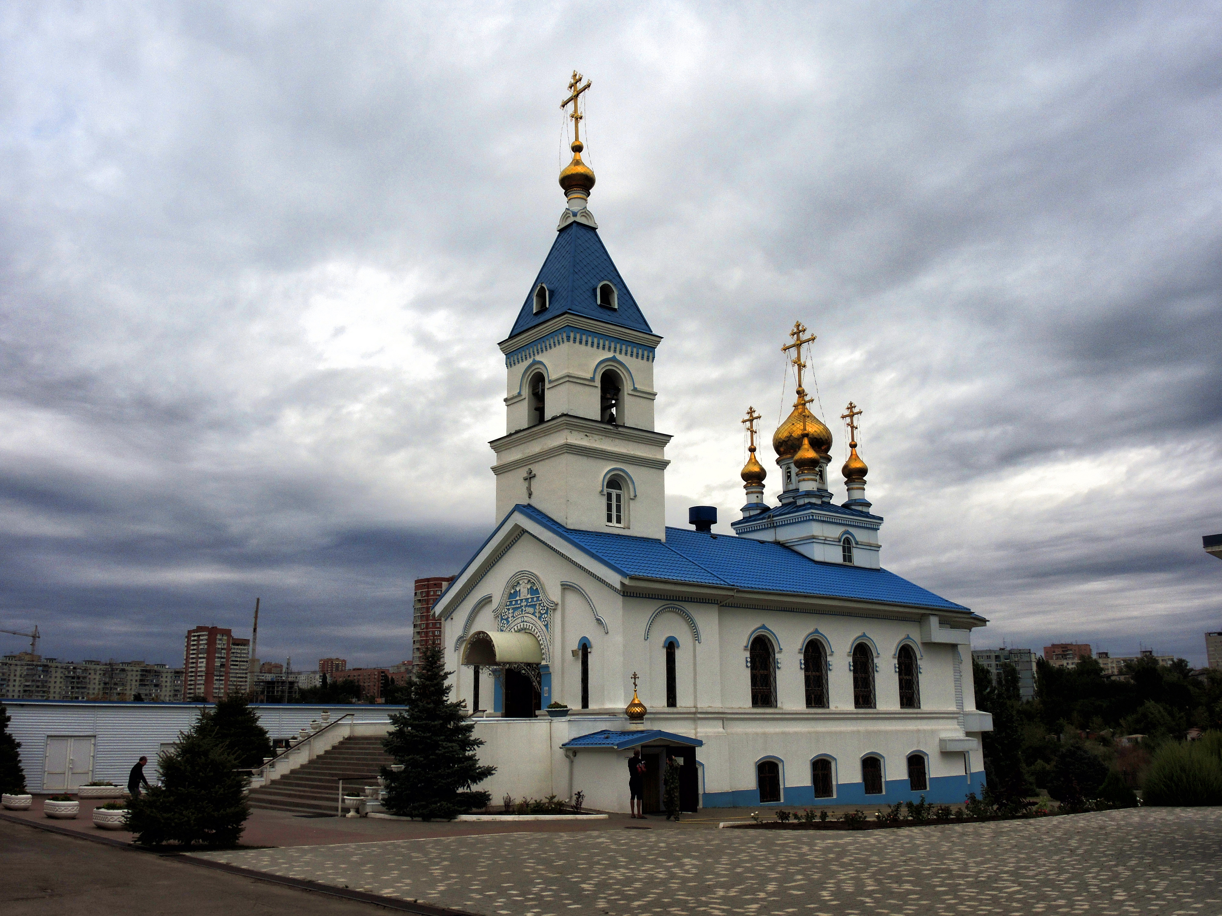 Иверская церковь, Монастырь Троицко-Алексеевский женский: улица Неклиновская, 3 (Северный жилой монастырь), Ростов-на-Дону, Ростовская область